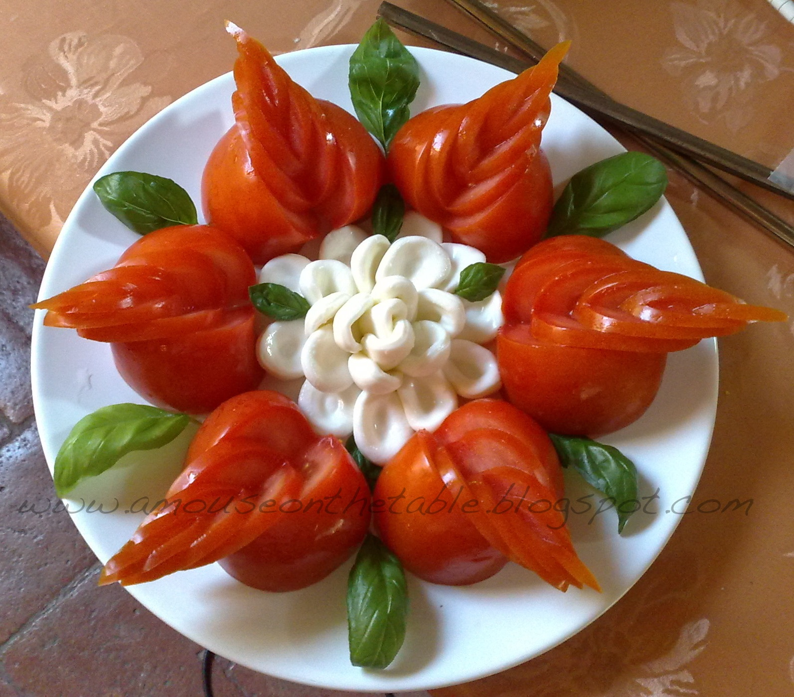 Caprese VisualFood